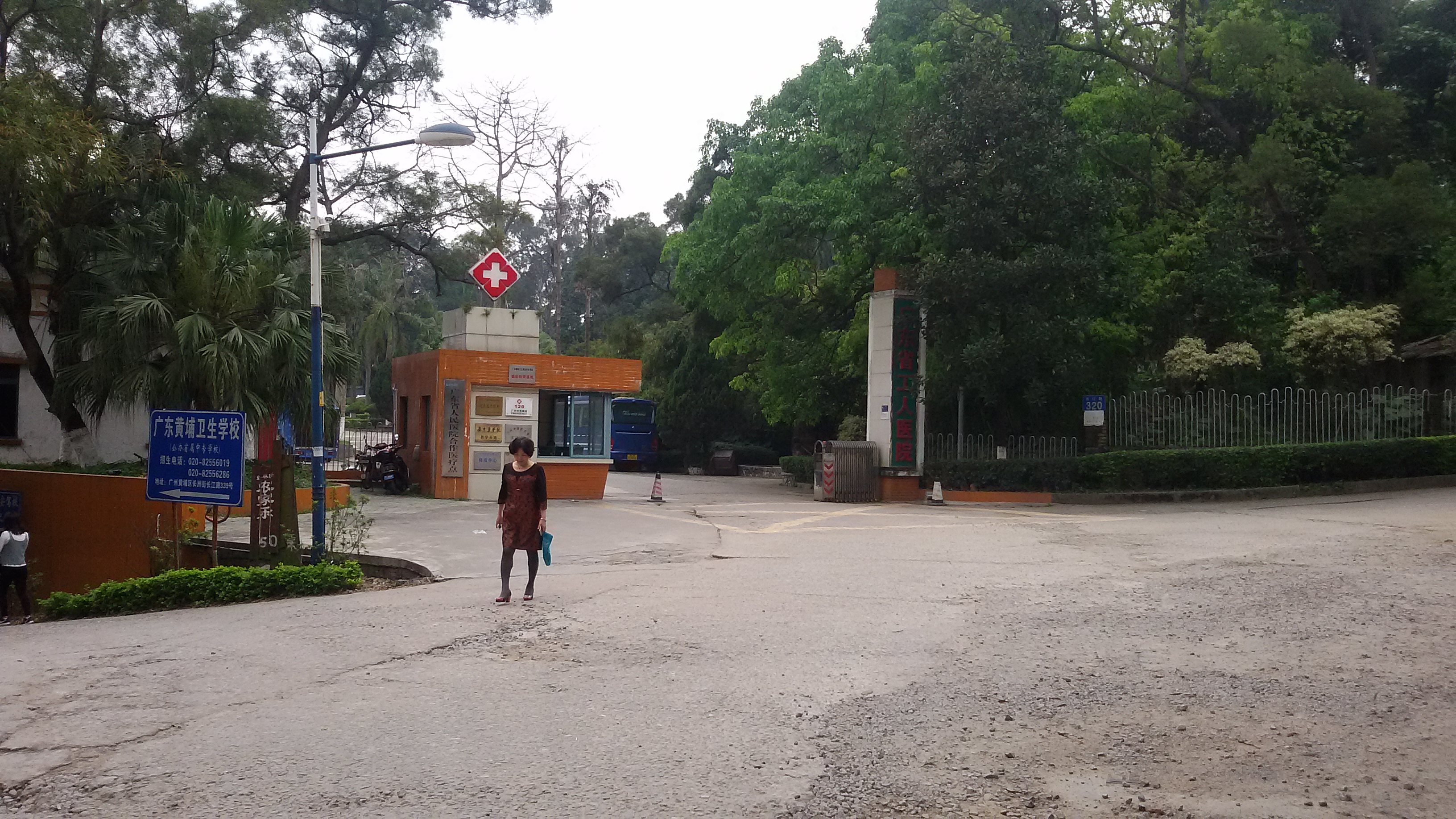 粵語: 廣東省工人醫院